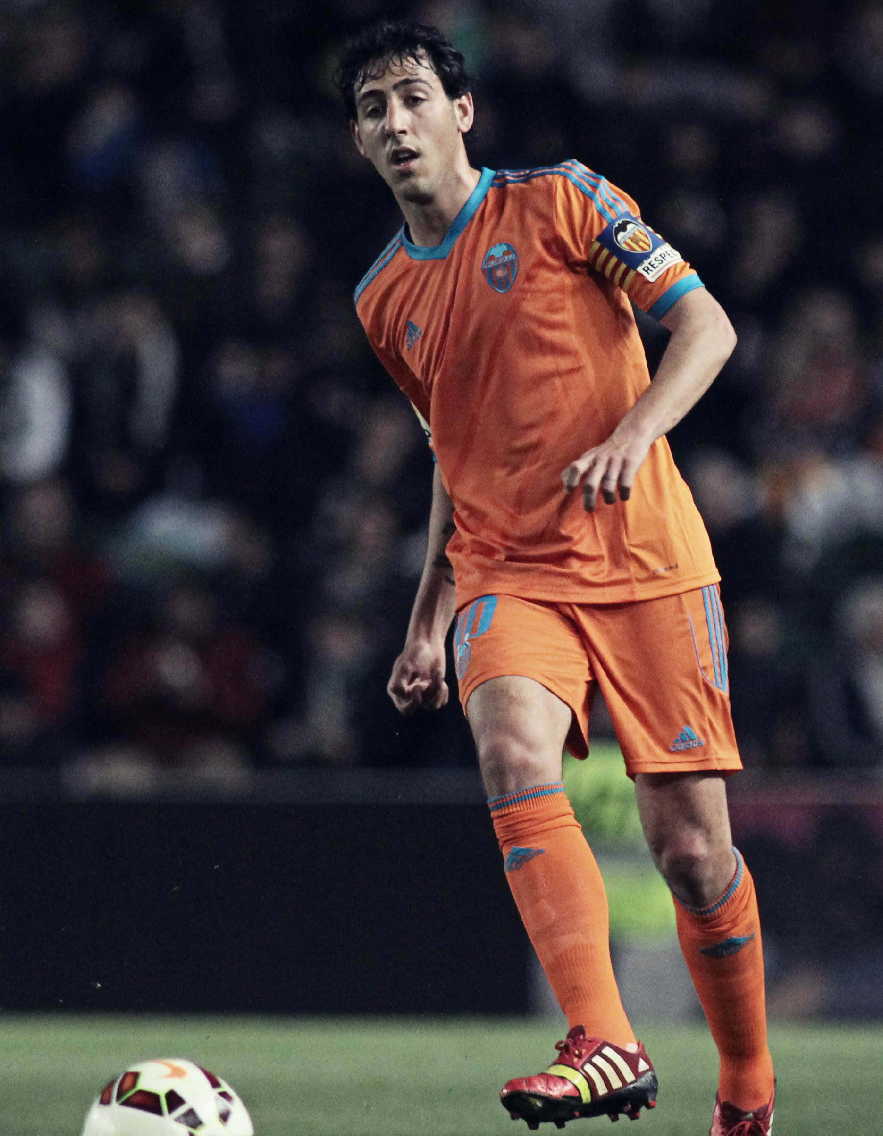 Dani Parejo playing for Valencia CF in 2015. Fotografía: Carla Cortés / @noaasoka